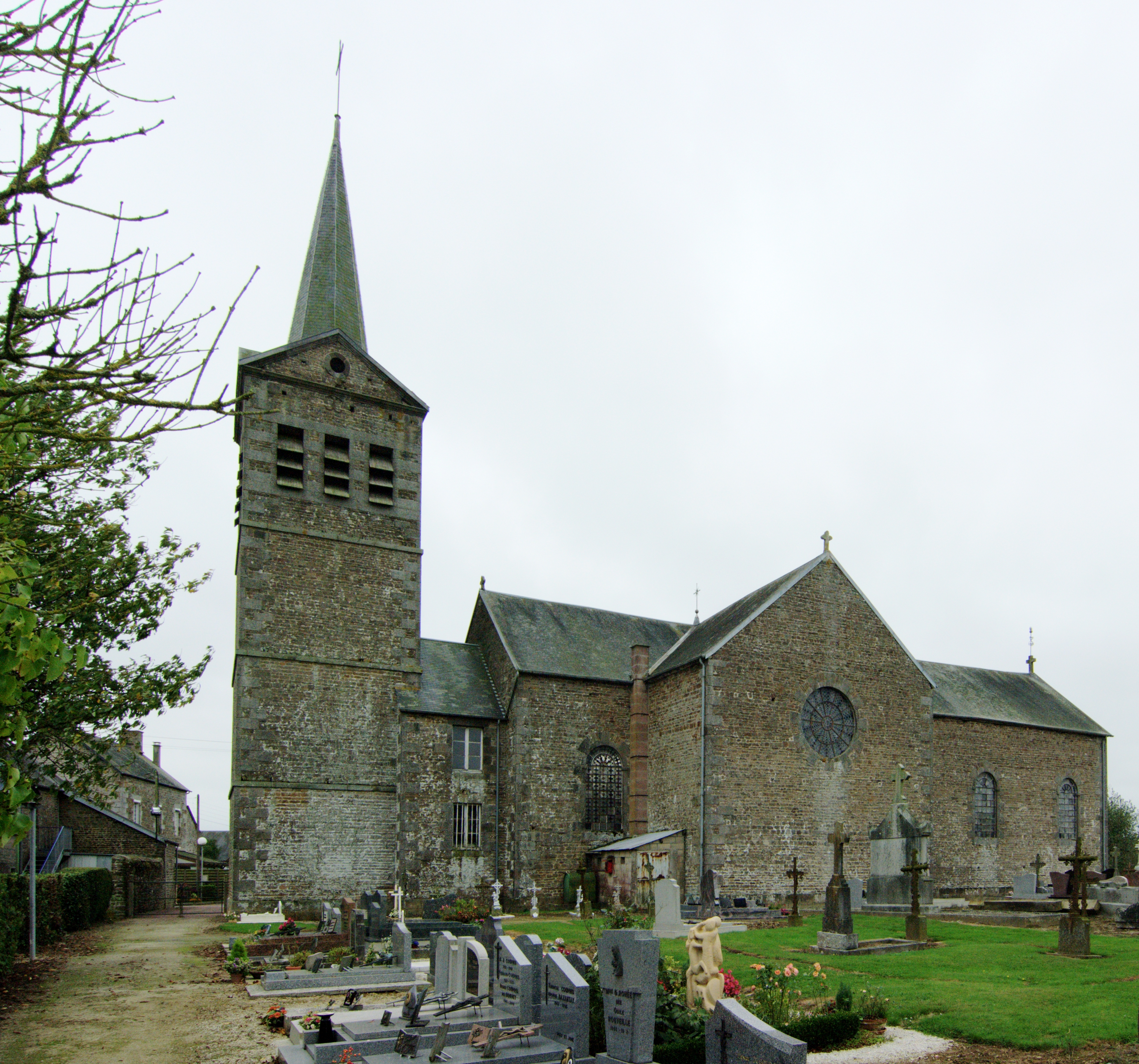 L'église de La Chapelle-Biche, Orne.